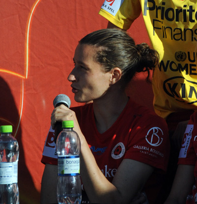 Johanna Rasmussen in June 2013